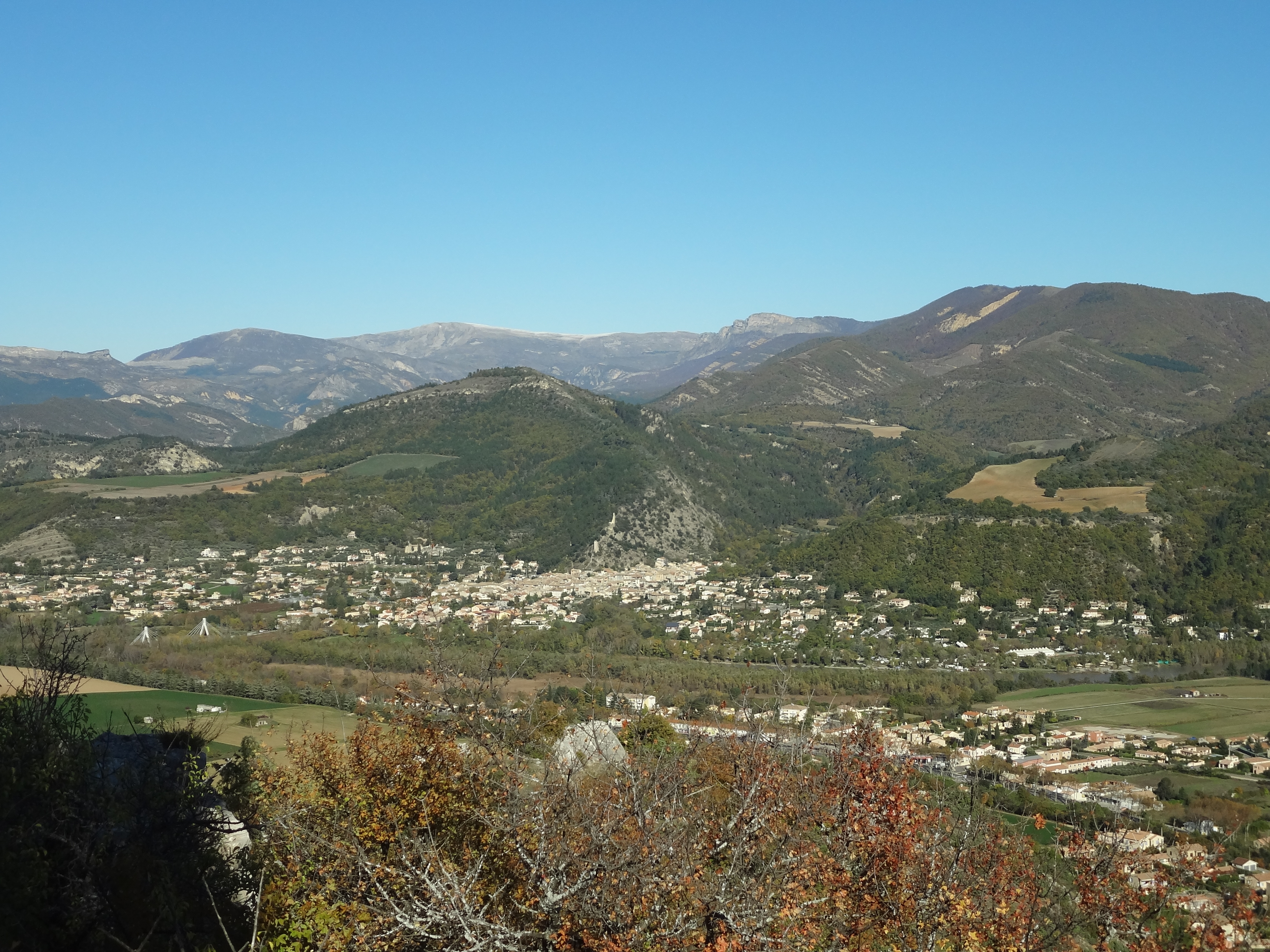 village de Volonne, colline de Tigne derrière (794 m), montagne de Jouère au fond à droite (1886 m)